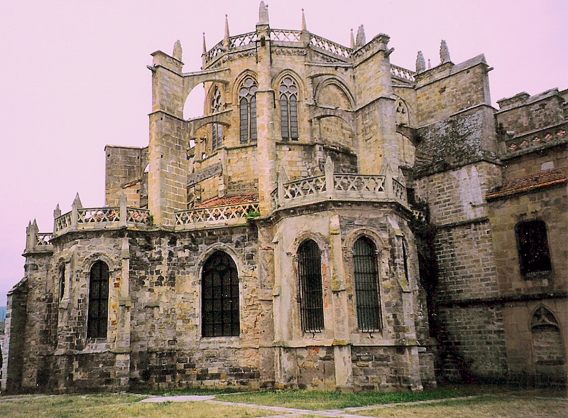 Absis de la iglésia de Santa María de la Asunción de Castro-Urdiales (Cantàbria, Espanya)